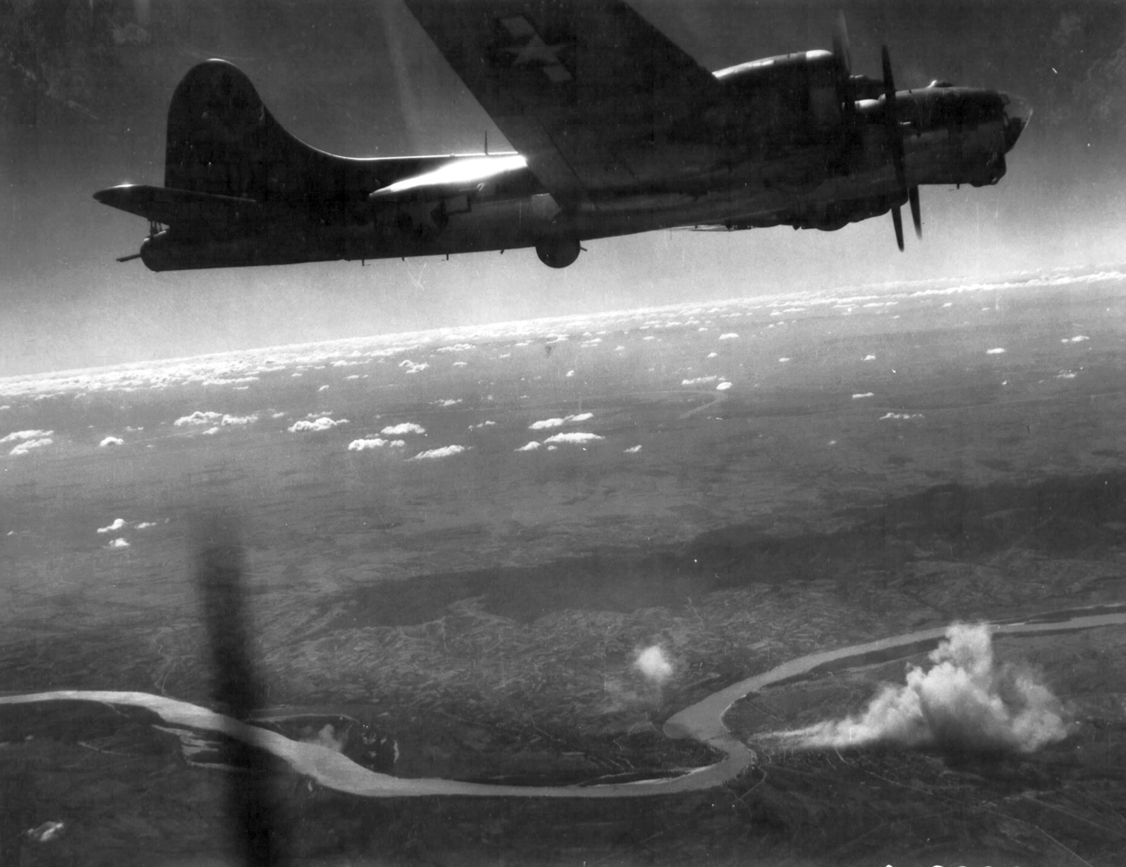 Duna a Bácska fölött repülő bombázókból nézve, Újvidéket fehér füst borítja. Location: Serbia, Novi Sad Tags: airplane, bombing, transport, second World War, Boeing-brand, american brand Title: Duna a Bácska fölött repülő bombázókból nézve, Újvidéket fehér füst borítja.